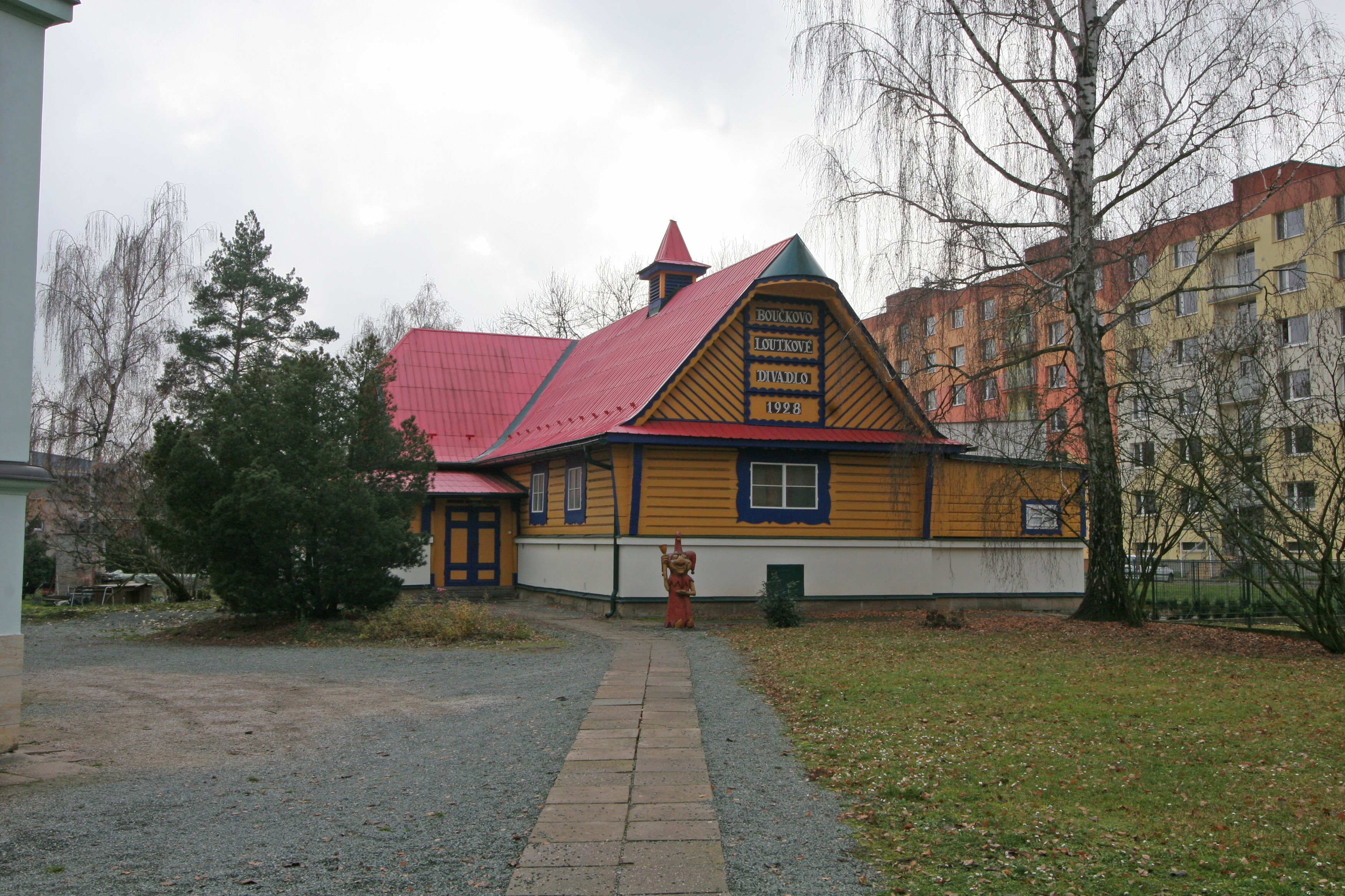 Boučkovo loutkové divadlo, Jaroměř-Pražské Předměstí, Albieriho 238